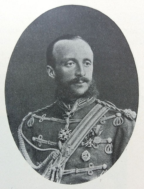 Флигель-адъютант полковник лейб-гвардии Гусарского Его Величества полка Лев Егорович Норд